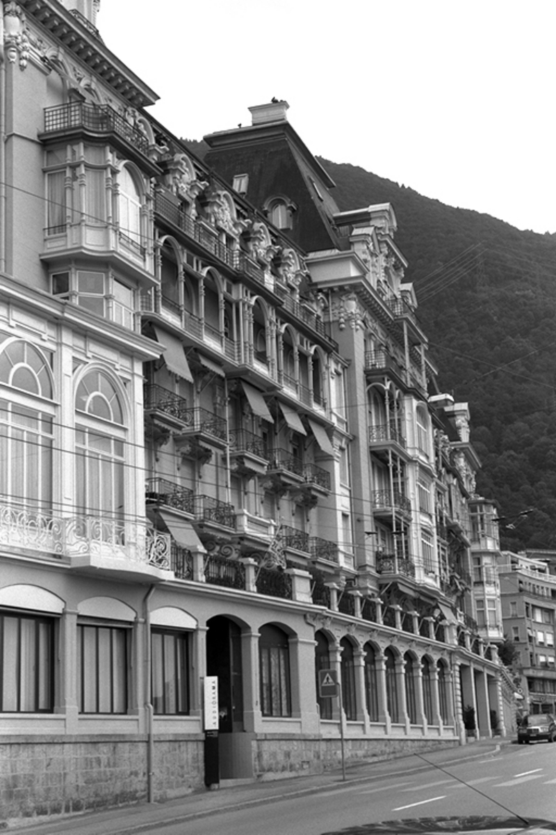 Territet, ancien Hôtel des Alpes